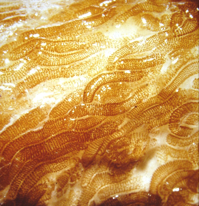 Dans les rivières très polluées, mais en présence d'un courant suffisant, du printemps à l'automne, des quantités impressionnantes d'oeufs peuvent être pondues par le chironomes. Ici chaque point visible sur la macrophotographie est un oeuf. Il s'agit des oeufs pondus en une seule nuit sur une surface lisse immergées de manière à ce qu'elle affleure l'eau, à Blendecques (France), dans le fleuve Aa, dans les années 1985-1990 au moment où il était le plus pollué. Sur cette section, les sédiments y étaient constitués principalement des rejets chroniques d'une papeterie à la station d'épuration de capacité insuffisante et dysfonctionnant, offrant un habitat idéal au chironome plumeux, dont des milliards de larves creusent des galeries où ils se nourrissent. Cette larve est l'un des rares organismes invertébrés (avec une sangsue et des tubifex) à survivre dans les sédiments très chargés en matière organique en décomposition). Elles contribuant à aérer la vase contribuent au processus d'autoépuration et à la transparence de l'eau.